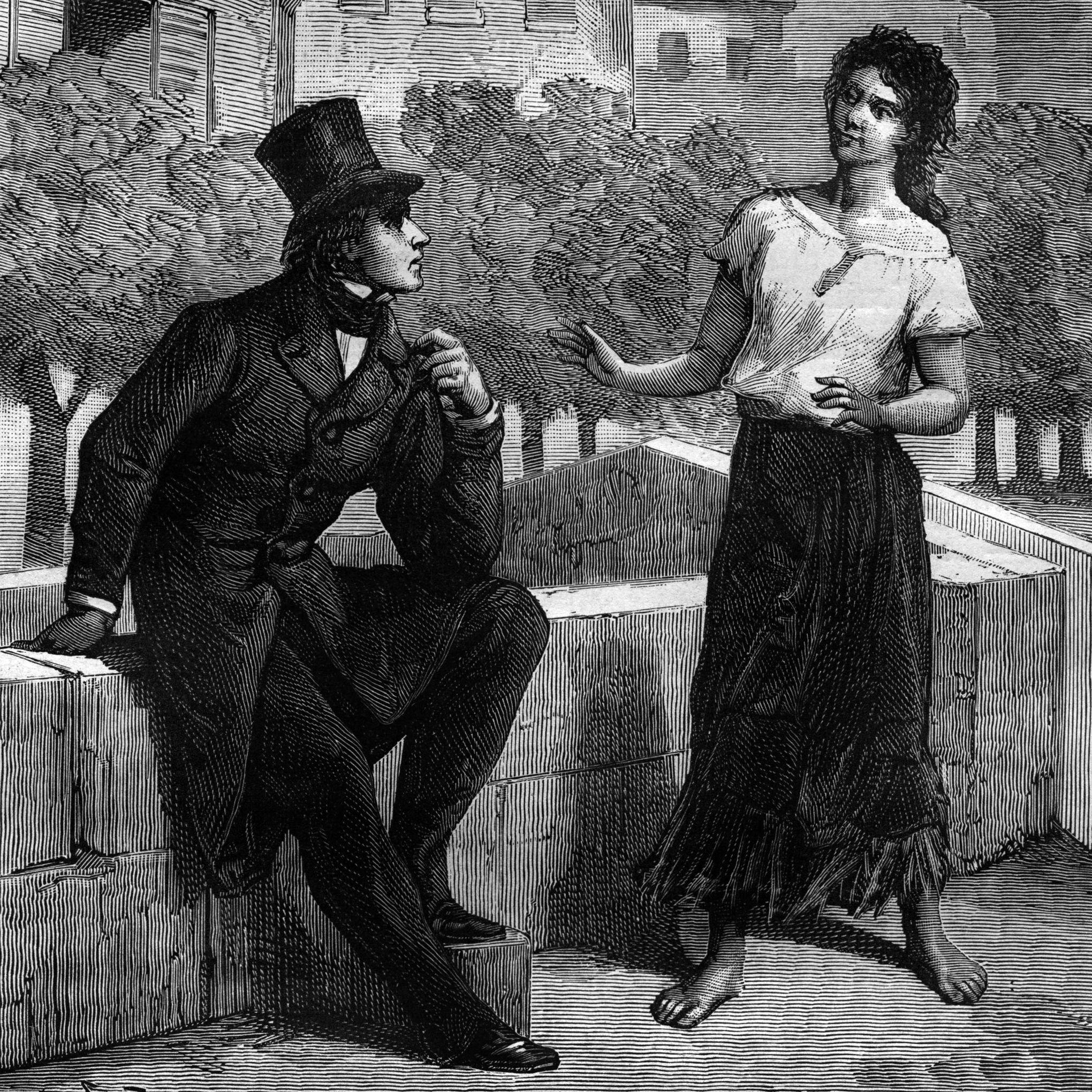 Apparition à Marius par Gustave Brion, 1862.